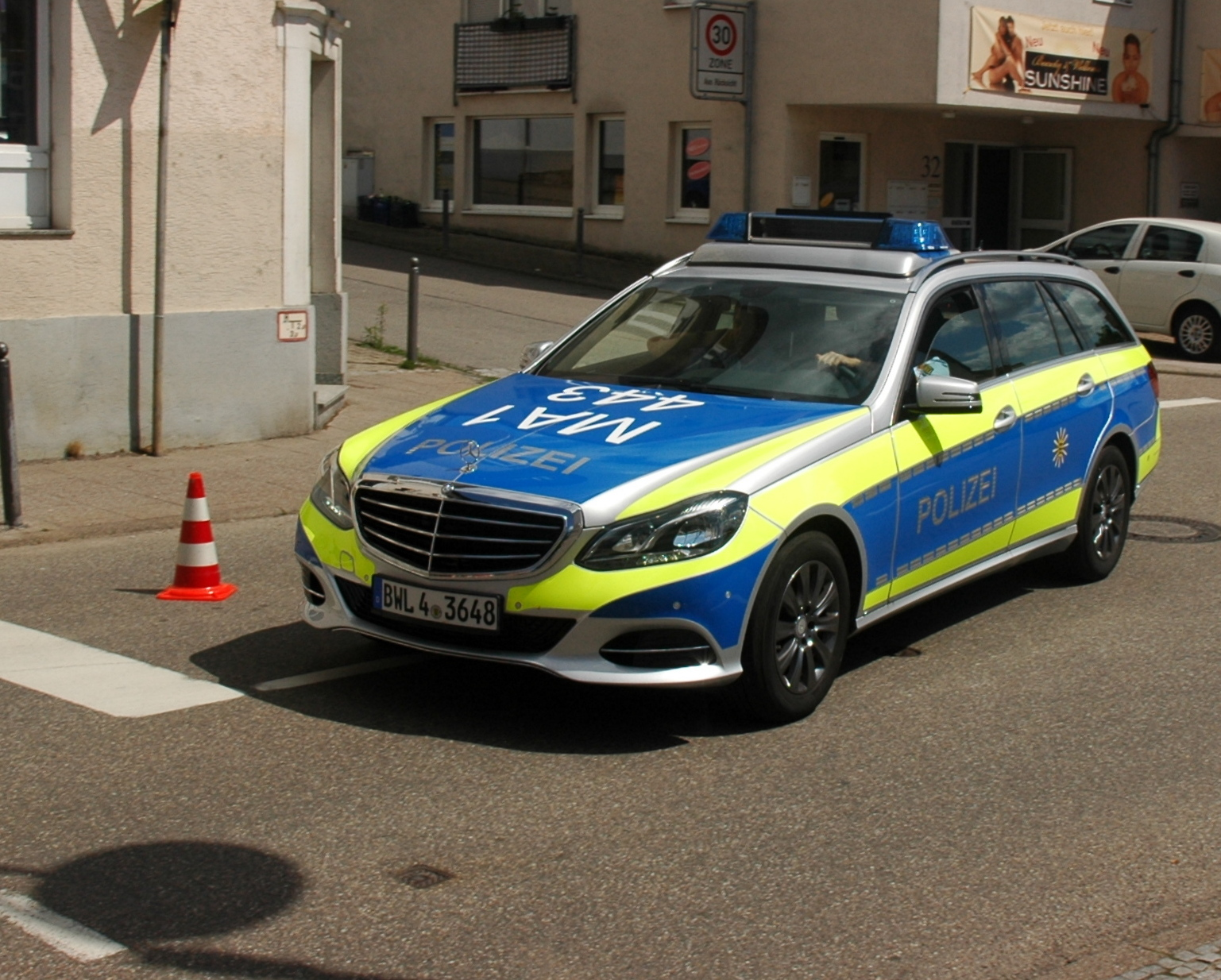 Mercedes-Benz Polizei BWL4 3648 MA 1 443 in Bammental.